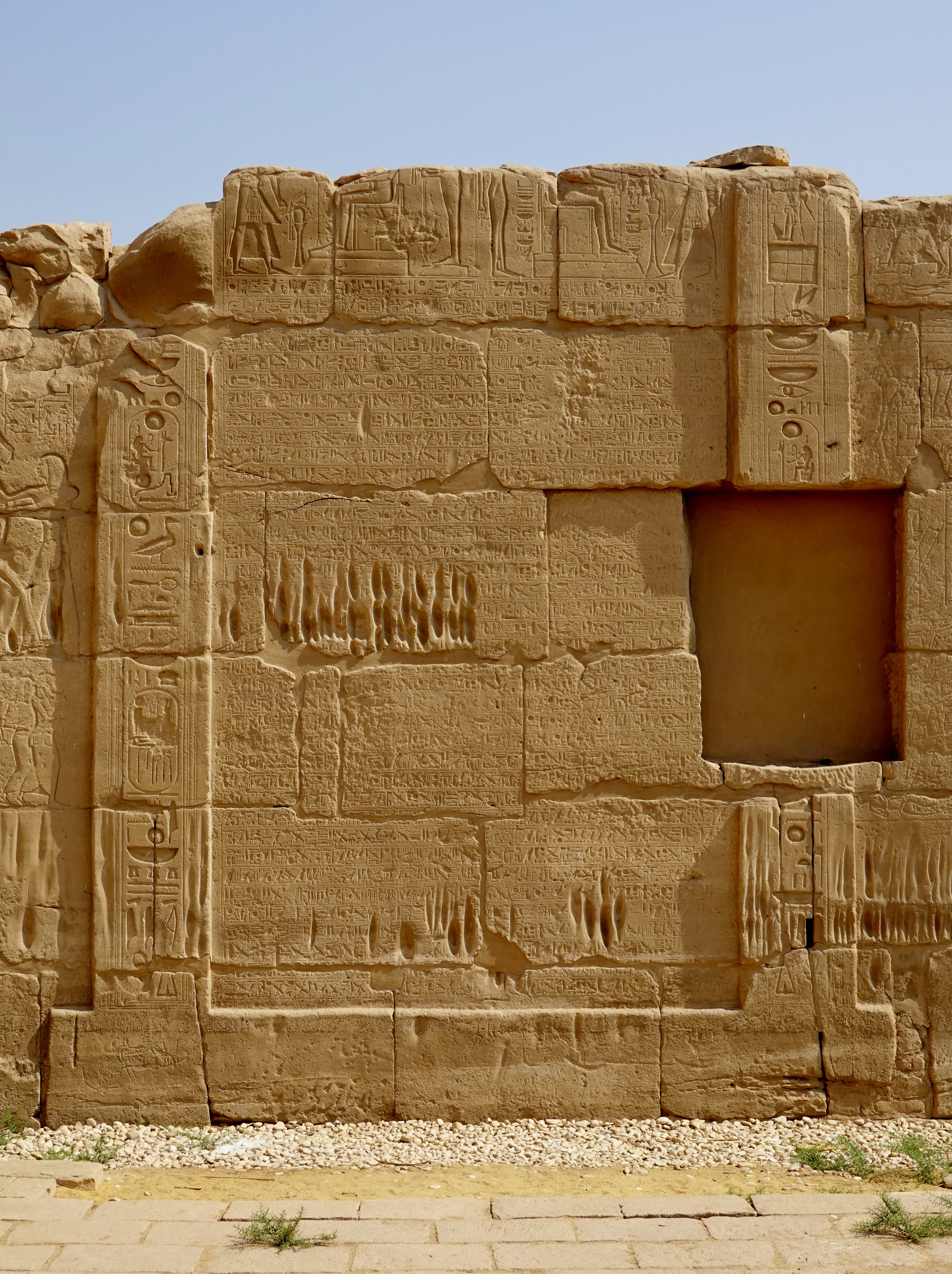 Ägyptisch-Hethitischer Friedensvertrag an der westlichen Außenwand des Cachette-Hofes im Tempel von Karnak, Luxor, Ägypten